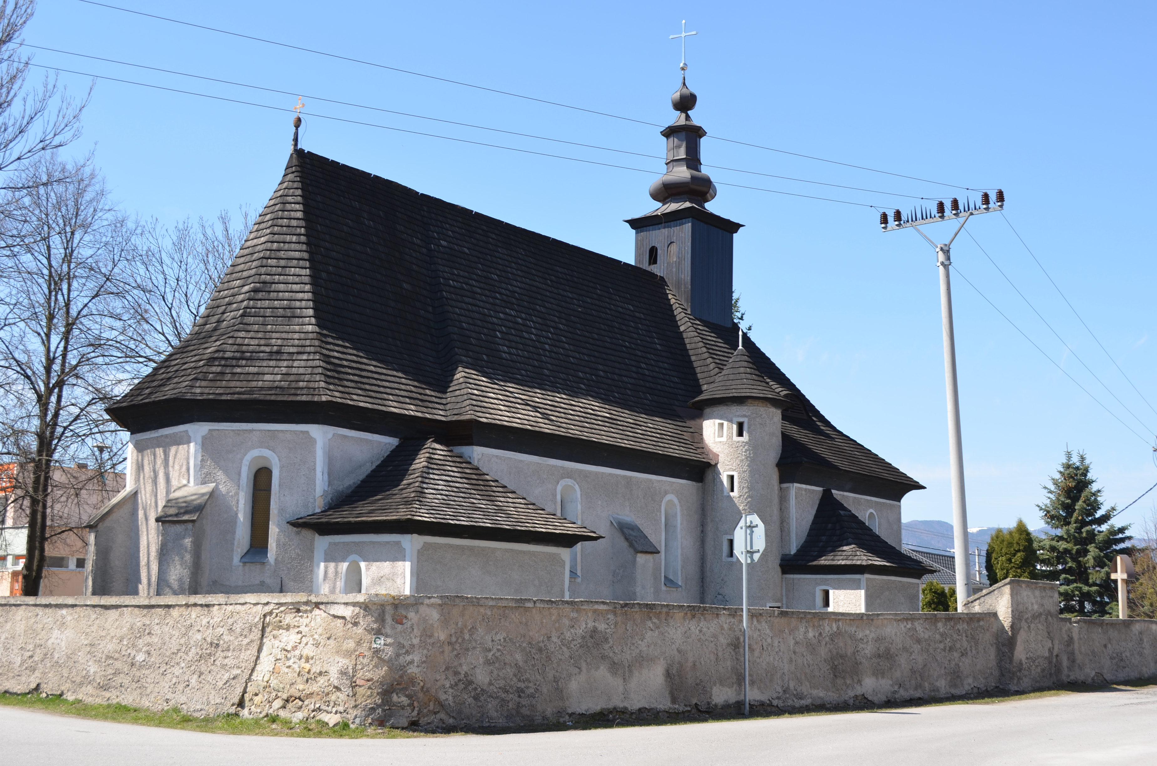 Pribóc